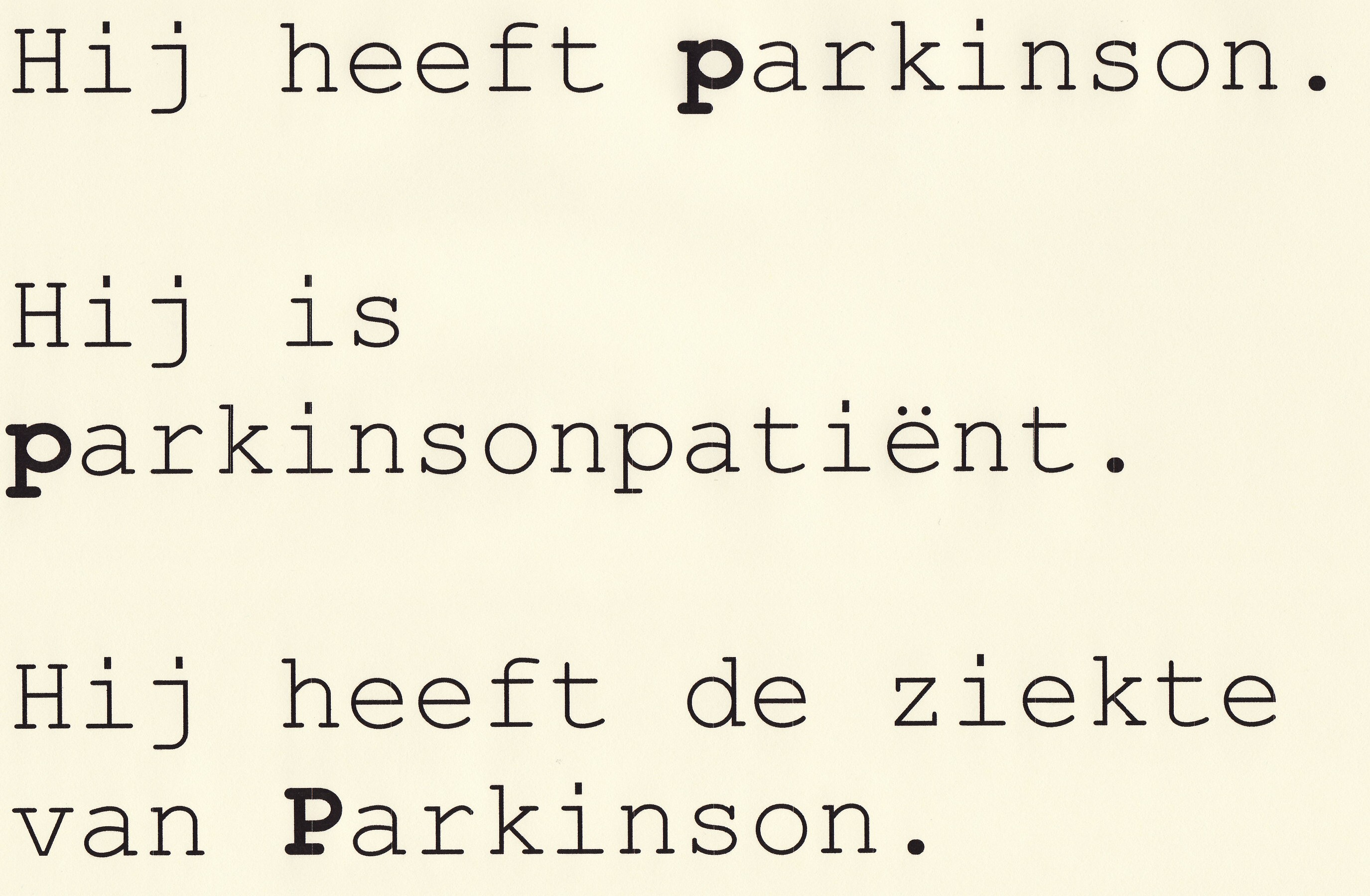 Zelf gemaakt, PD.